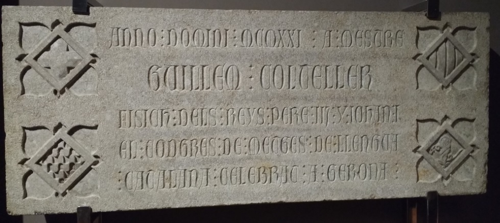 Làpida que Rafael Masó dedica a Guillem Colteller Autoria: Rafael Masó i Valentí Material: Pedra Nummulítica de Girona Datació: 1921 MHG